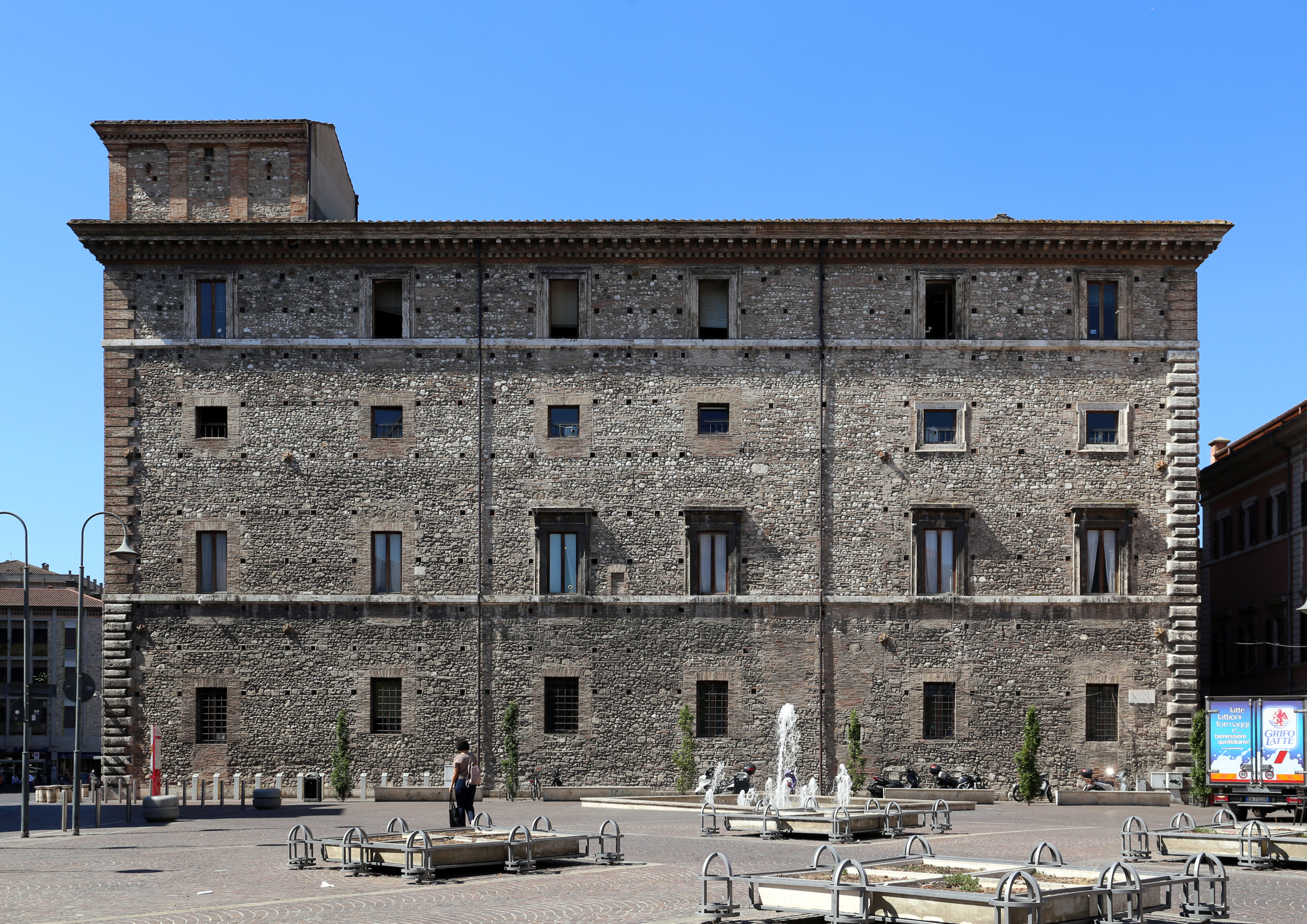 Palazzo Spada (Terni) This is a photo of a monument which is part of cultural heritage of Italy.